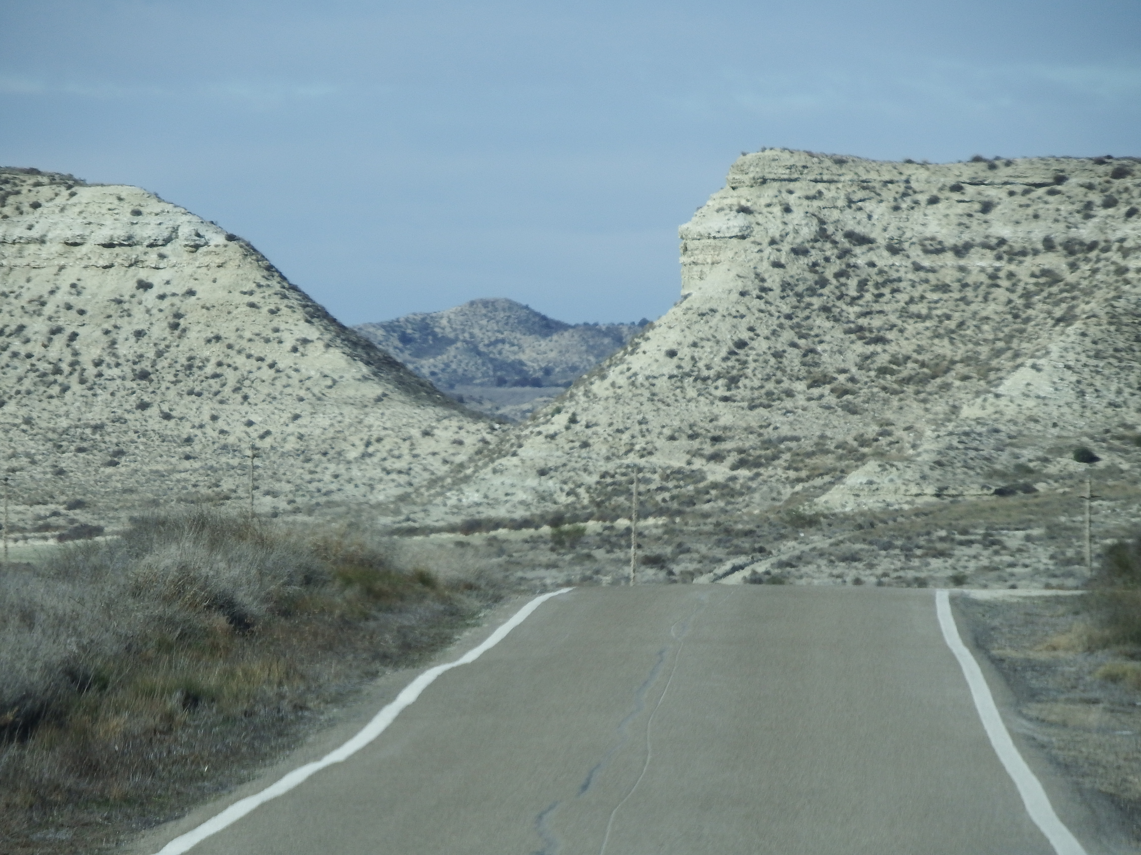 Paisaje de Monegros en febrero de 2019